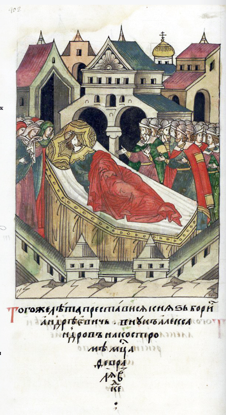 ЛИЦЕВОЙ ЛЕТОПИСНЫЙ СВОД В том же году преставился князь Борис Андреевич, внук Александров, в Костроме, месяца февраля в 25-й день.